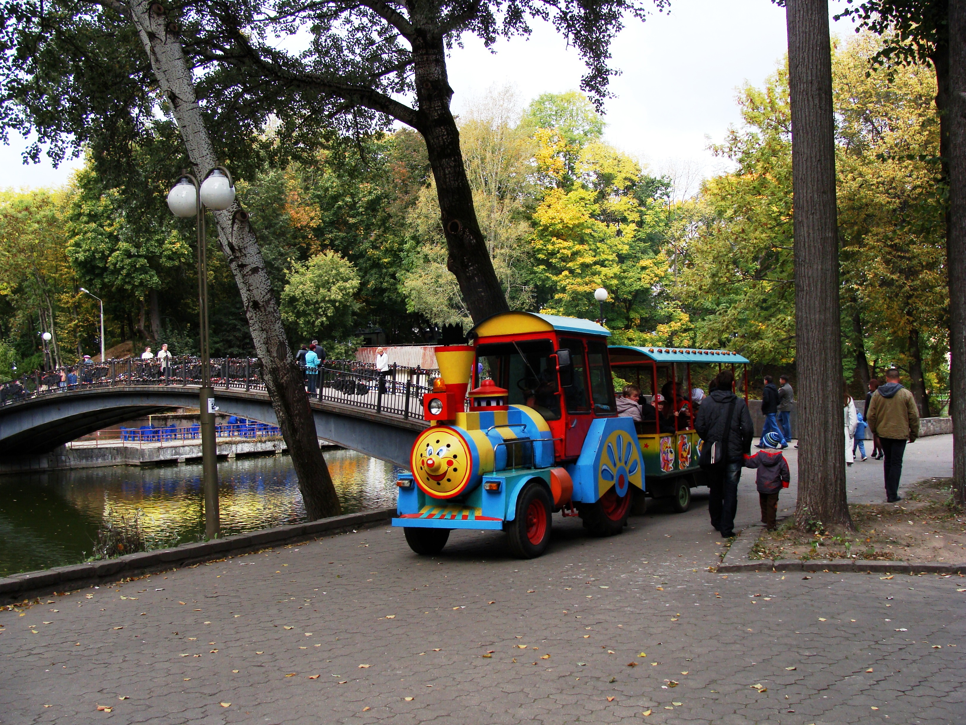 Паровозик, аттракцион в Лопатинском саду